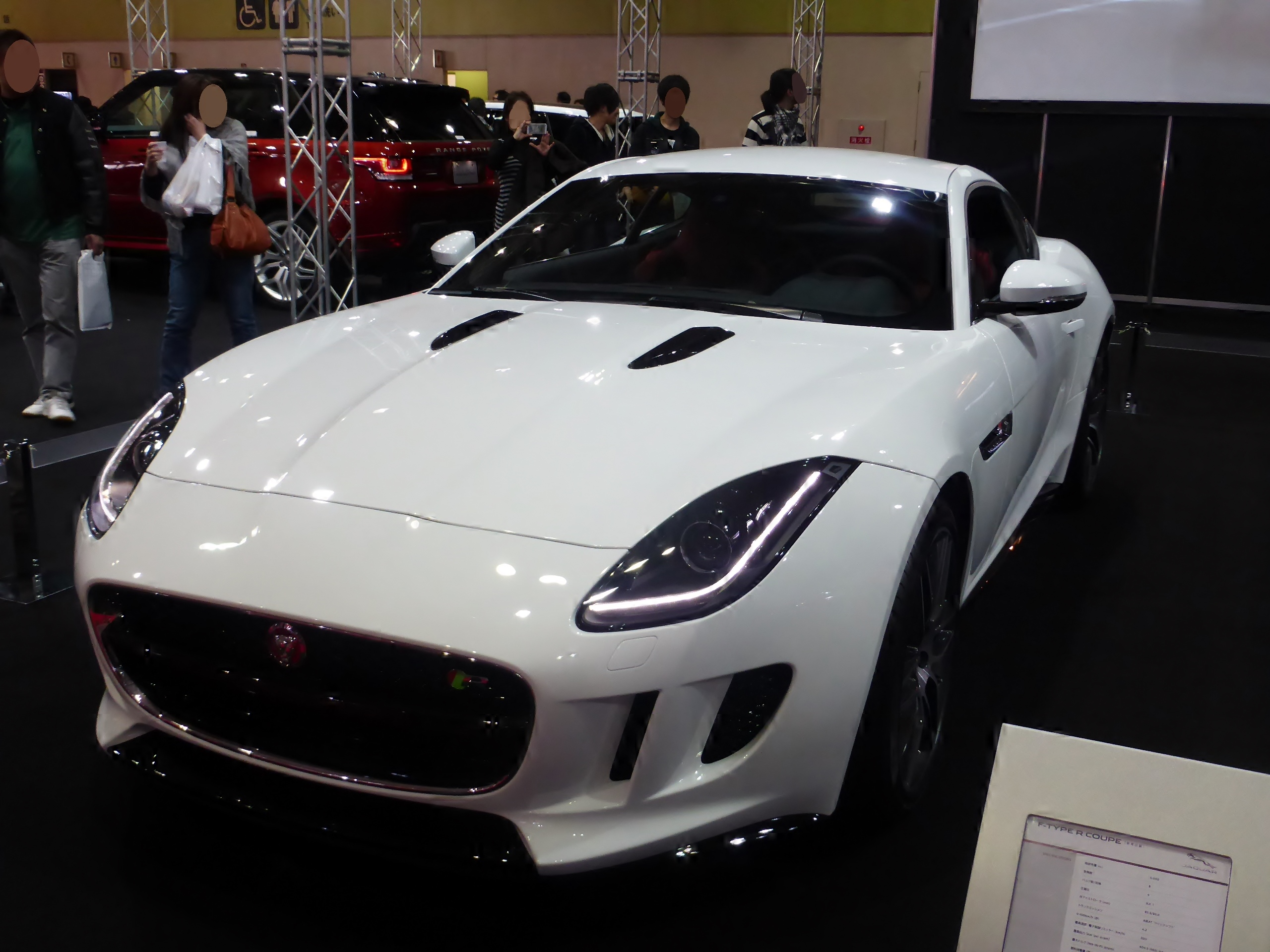 大阪モーターショー2013のジャガーブースにおいてFタイプRクーペを撮影。